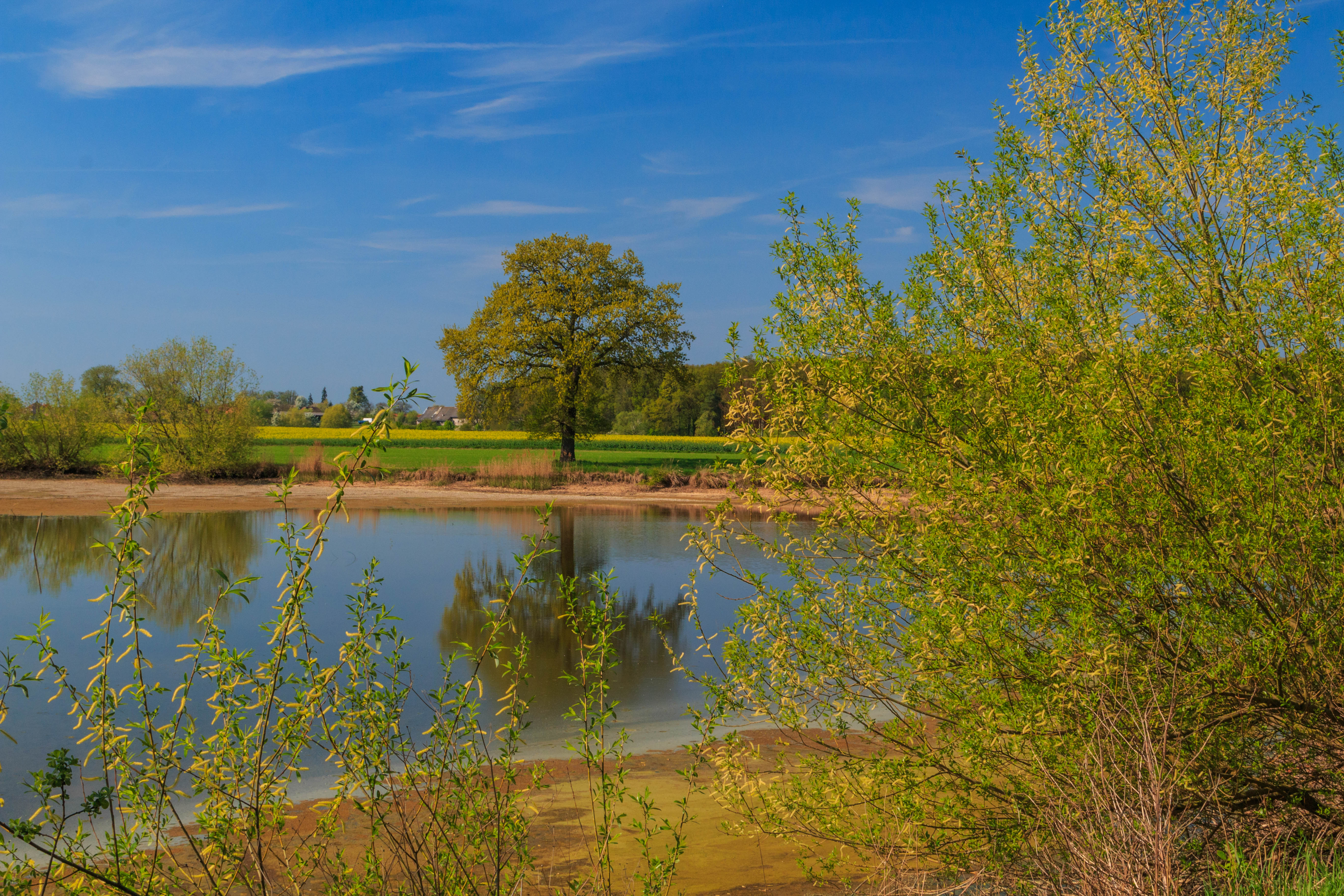 rybník u Lukové Project: Vodstvo.